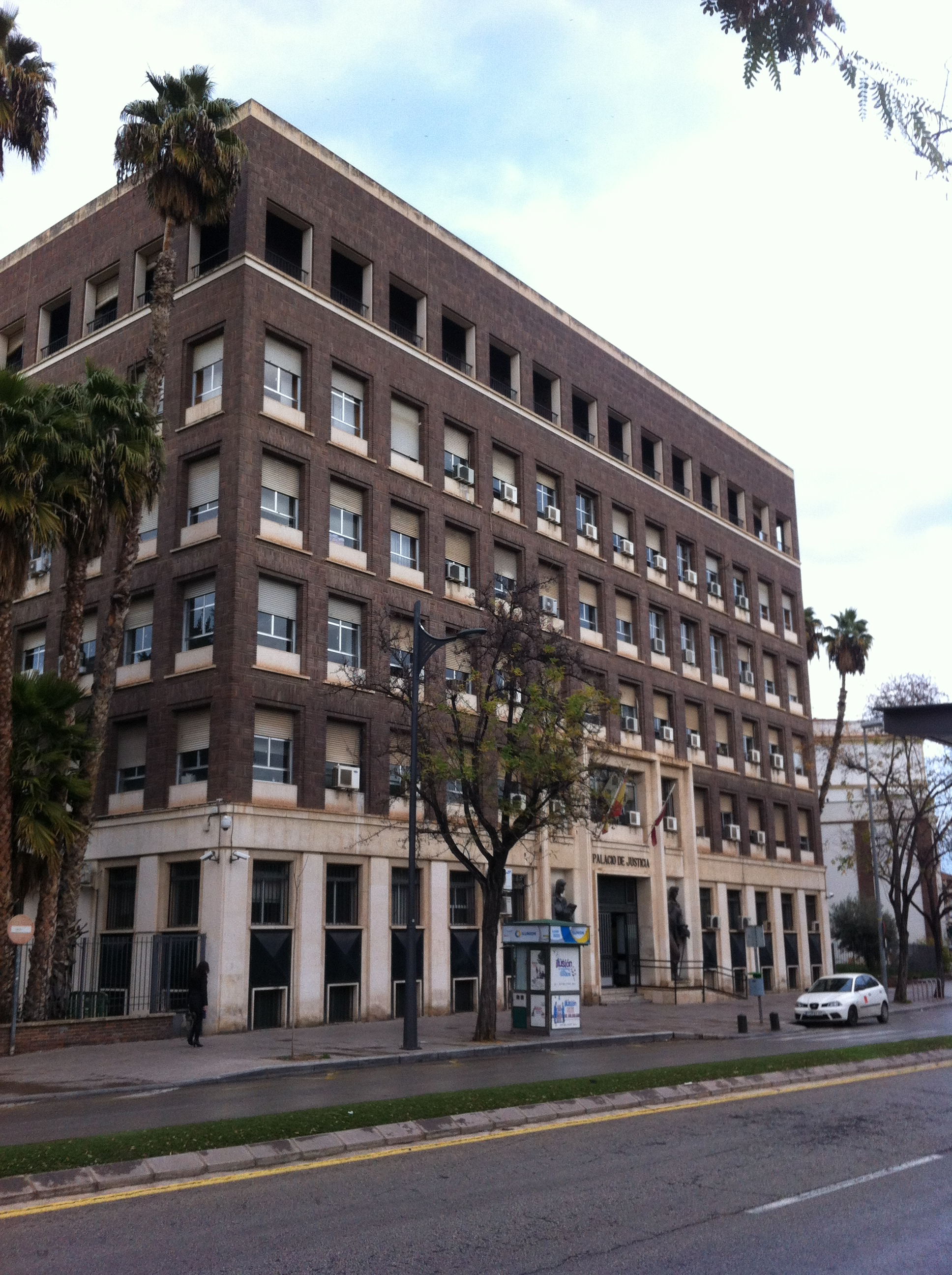 Sede histórica del Tribunal Superior de Justicia de la Región de Murcia